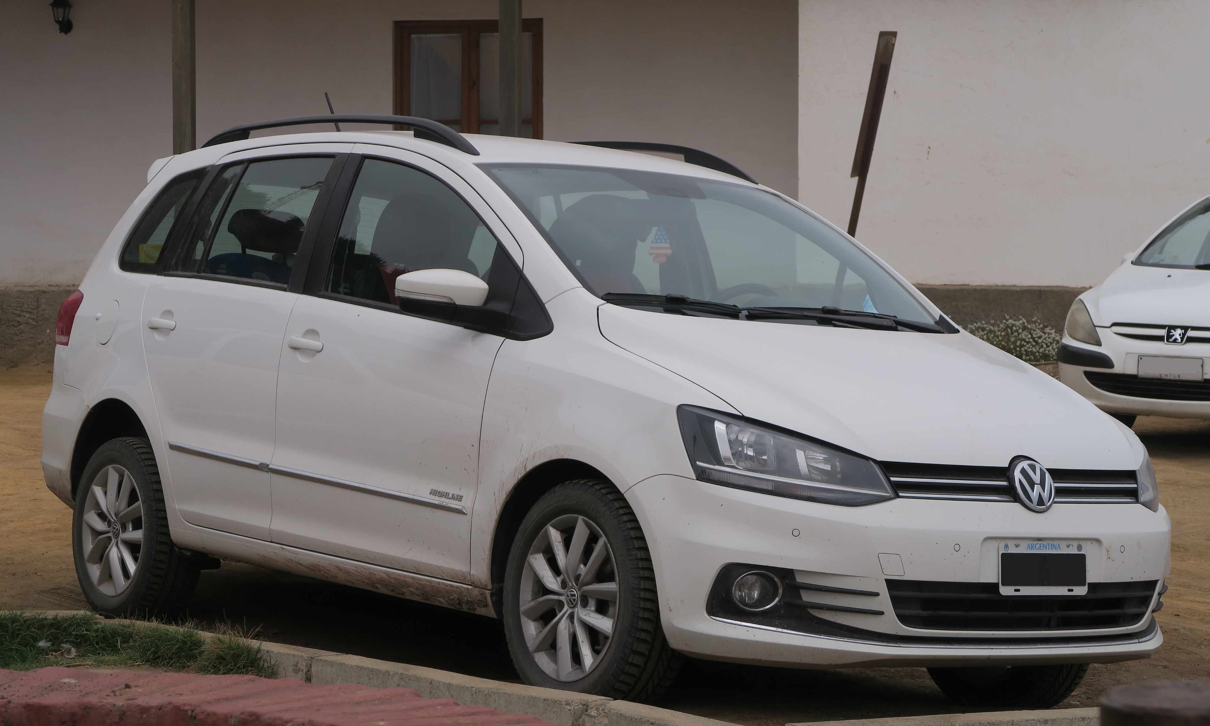 Volkswagen Suran 1.6 Highline 2016